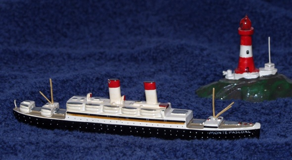 Wiking-Schiff und Leuchtturm, um 1936